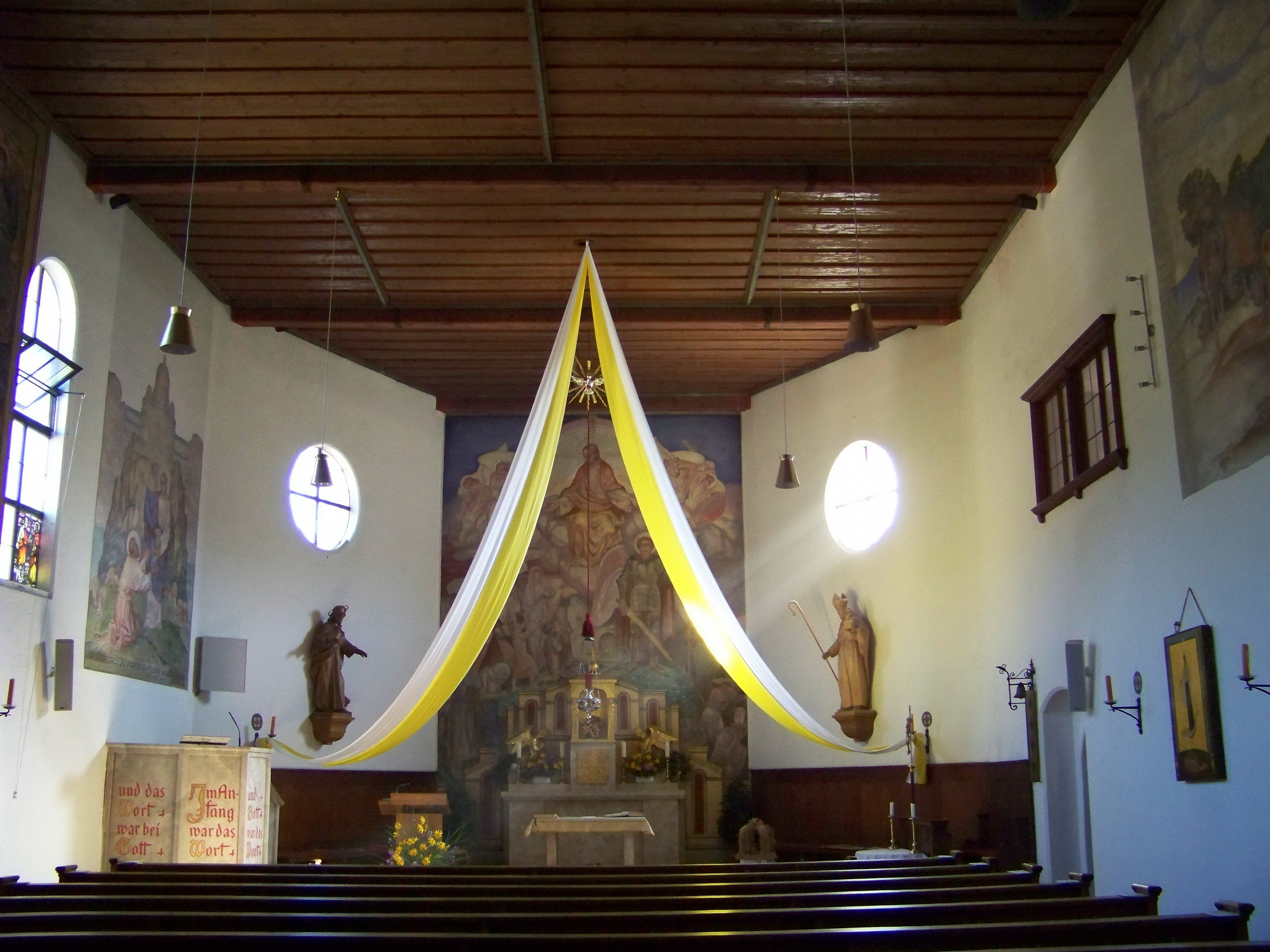 Nittendorf, Etterzhausen, Kirchbergstraße 9. Kath. Expositurkirche St. Michael. gestelzter Saalbau mit abgewalmtem Satteldach, Flankenturm mit Spitzdach, 1937/38 von Franz Günthner. Flach gedeckter Innenraum. Der Chor ist nicht ausgeschieden und schließt in drei Seiten.